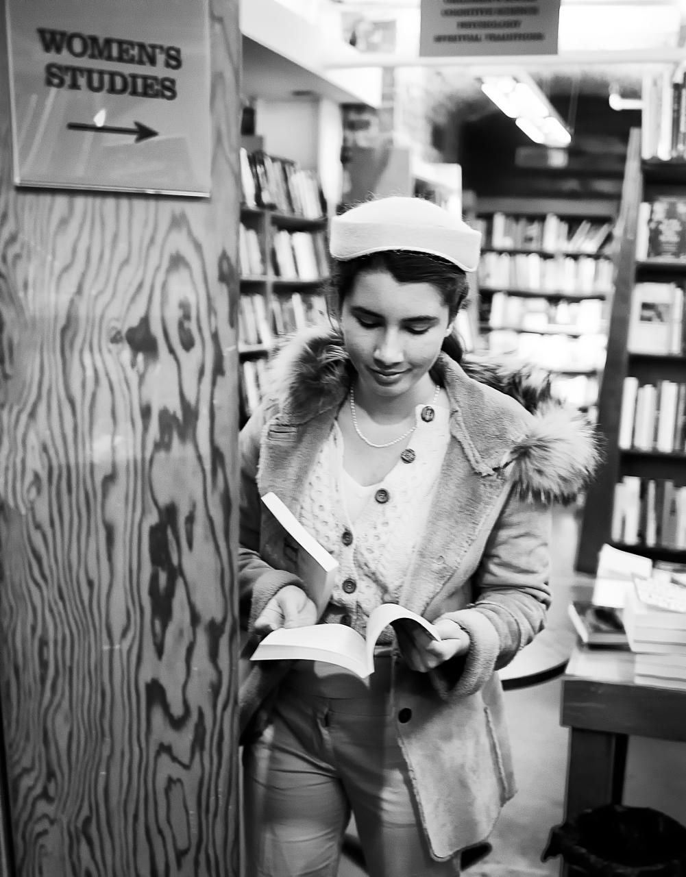 Women's Studies